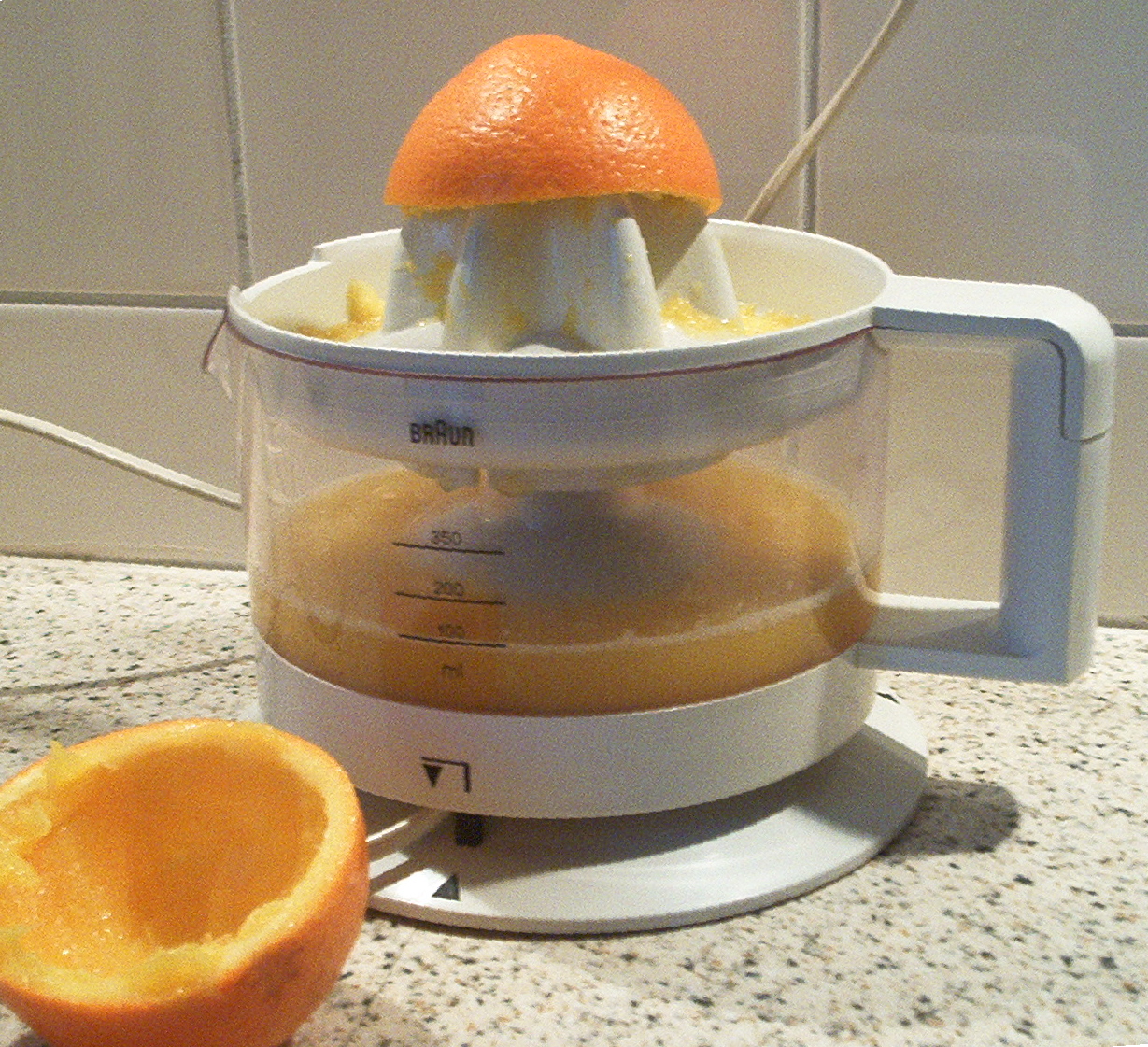 zelfgemaakte foto voor het publiek domein. Martink 28 jan 2007